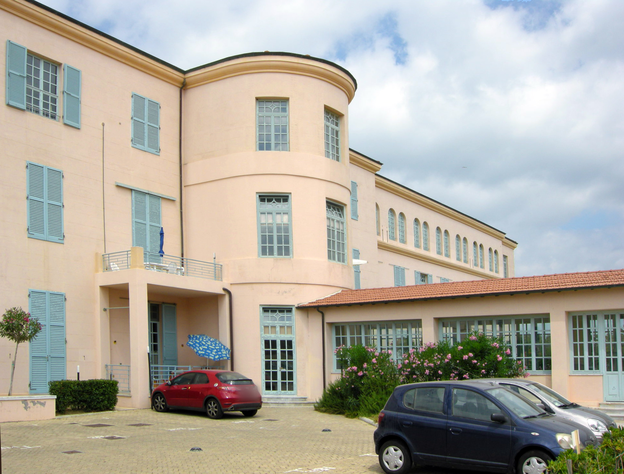 Colonia principi di piemonte